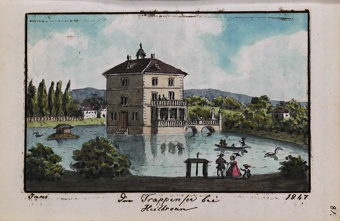 Der Trappensee bei Hheilbronn 1847, aus dem Tagebuch 1837-1850 im Nachlass.